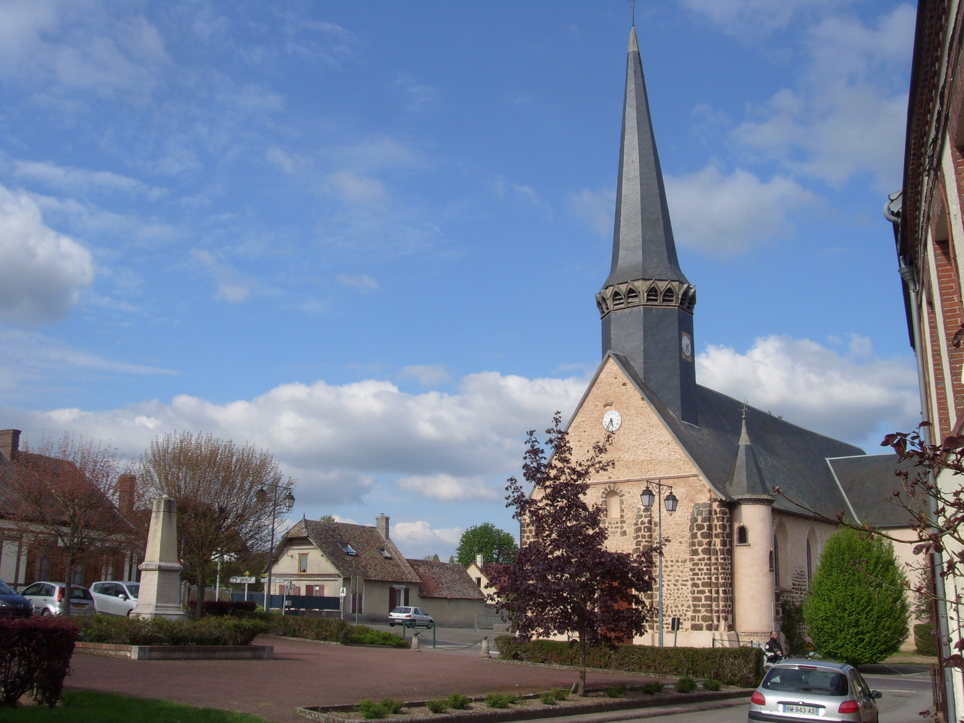 Place de l'Eglise à Laons, 28270 Eure-et-Loir.